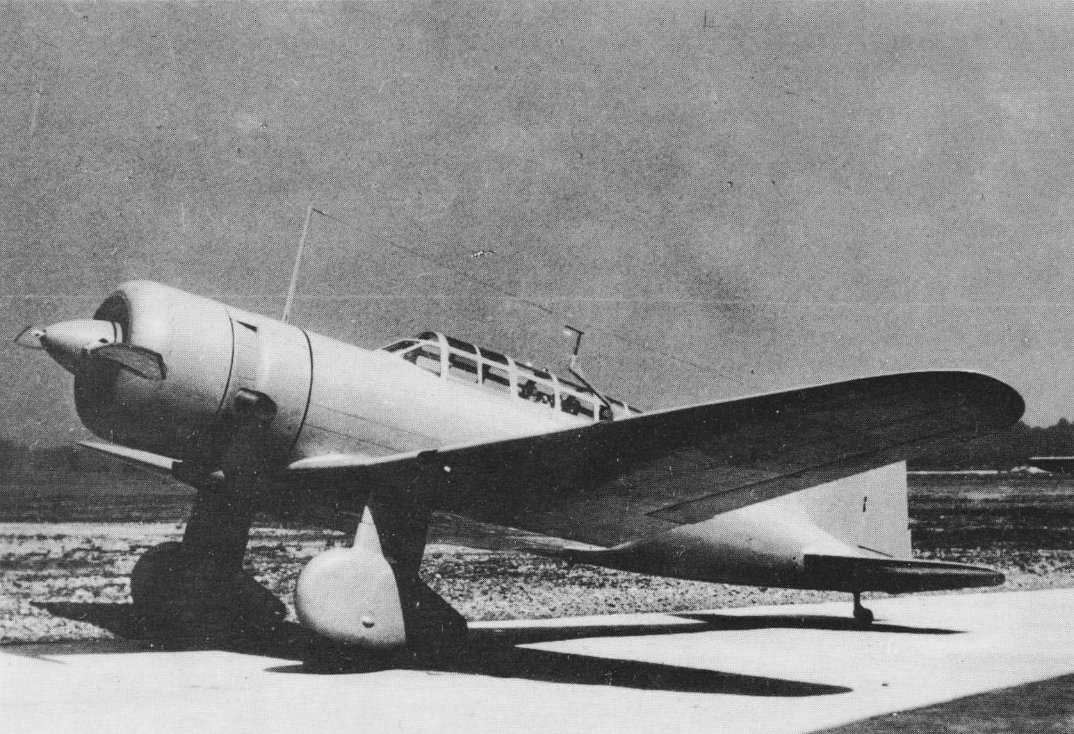 Mitsubishi Ki-15 "Babs", ricognitore monomotore ad ala bassa, data e luogo della scatto imprecisati.